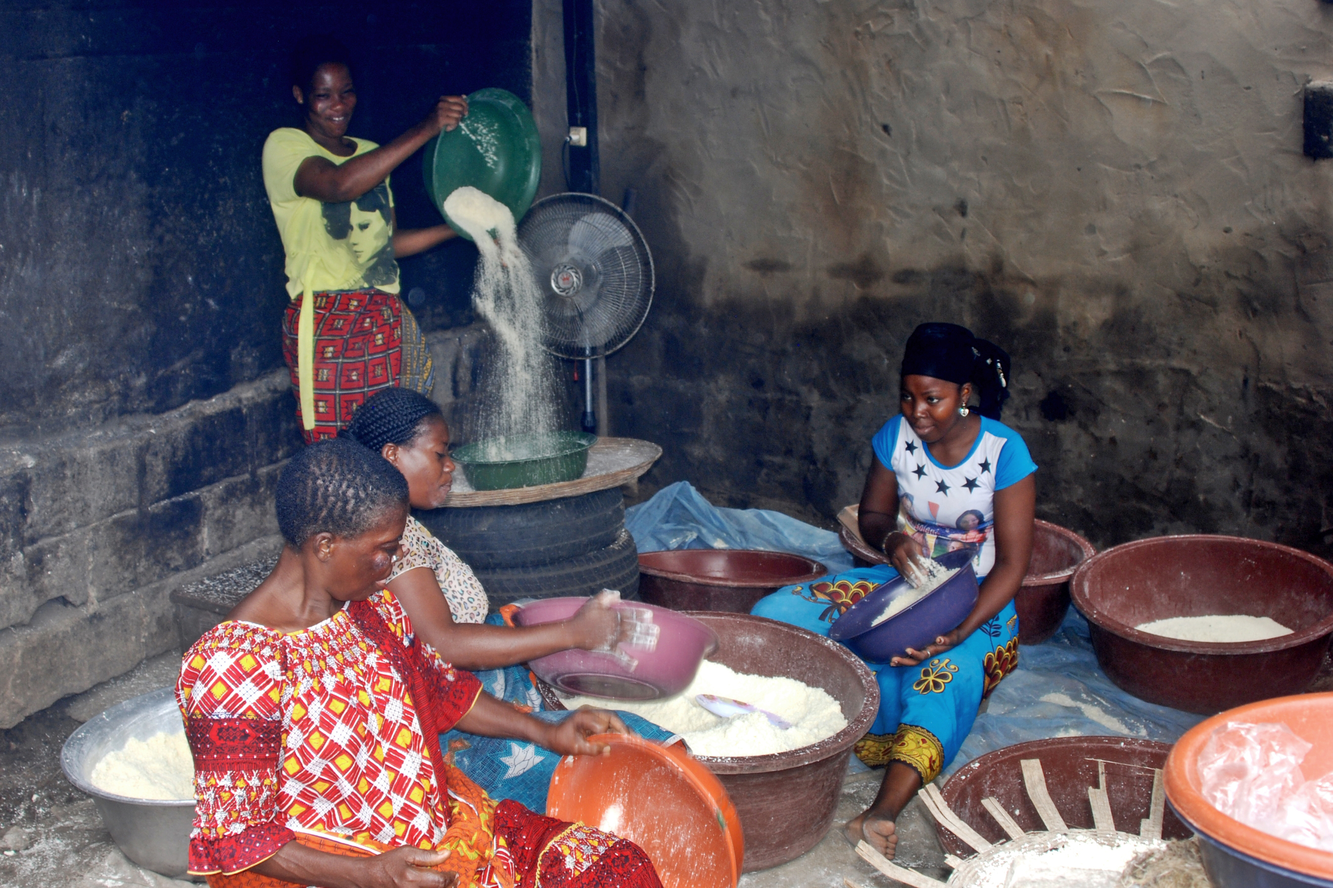 femmes confectionnant de l'attiéké à Abidjan This is an image of "African people at work" from Ivory Coast